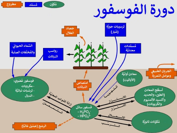 رسمٌ بيانيٌّ يُظهرُ دورة الفوسفور.